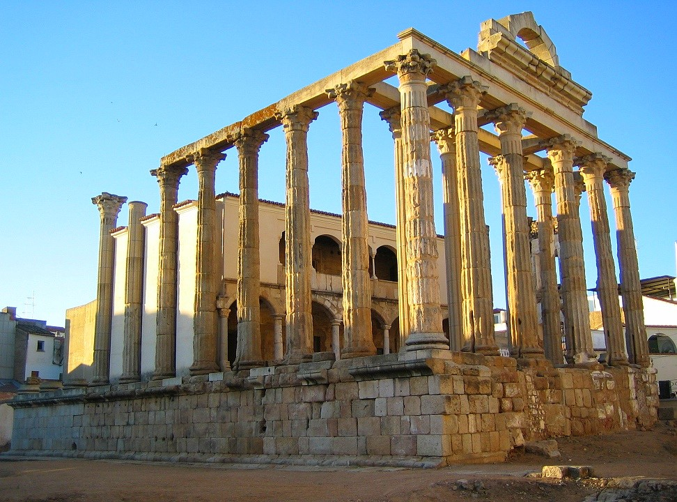 Le Temple de Diane à Mérida, Province de Badajoz (Espagne)